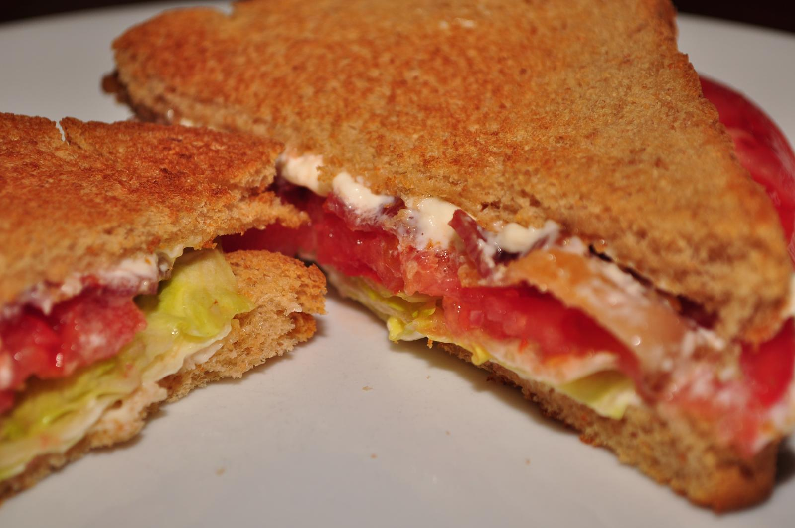 BLT